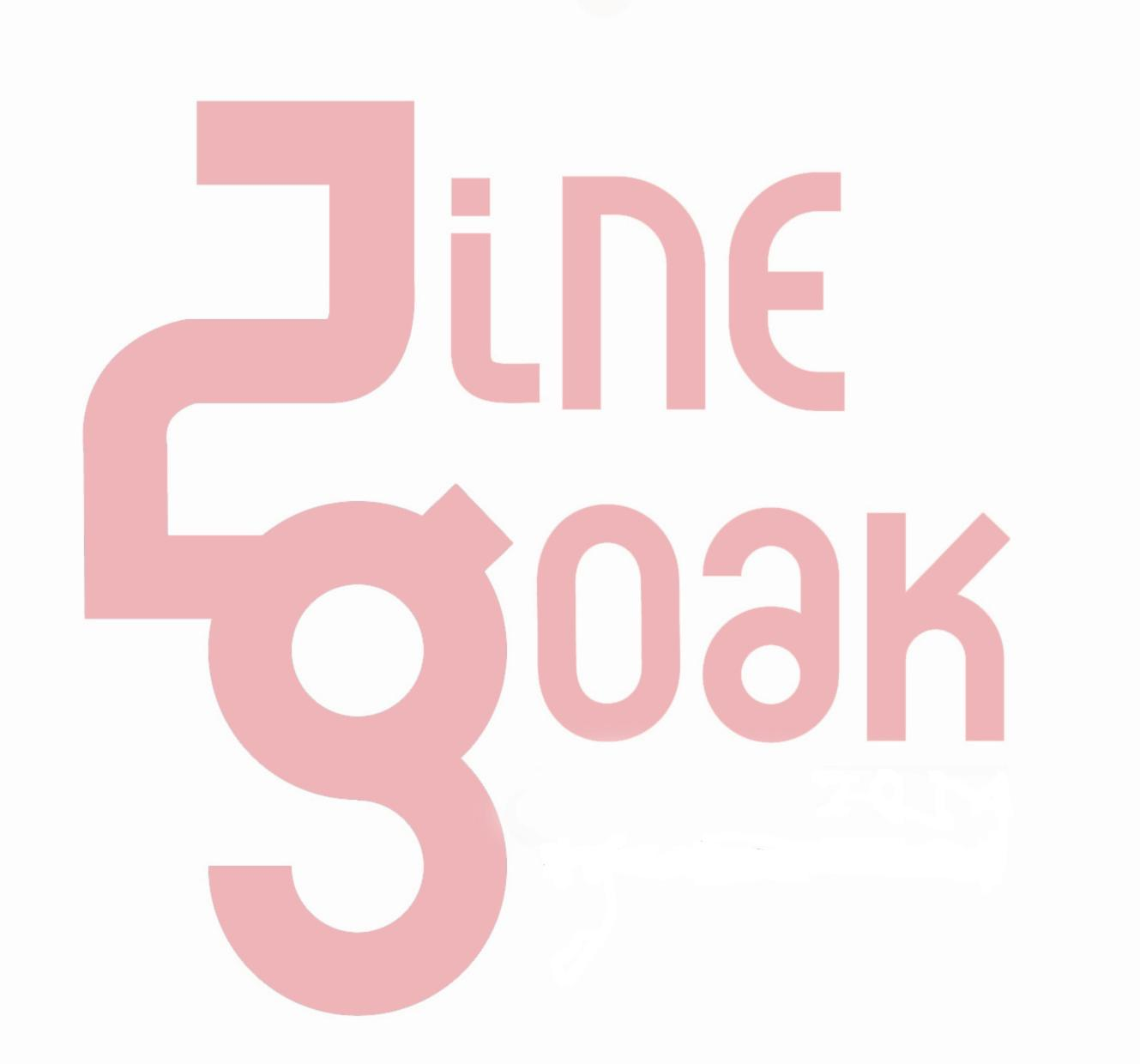 ZINEGOAK logo orokorra (2011)